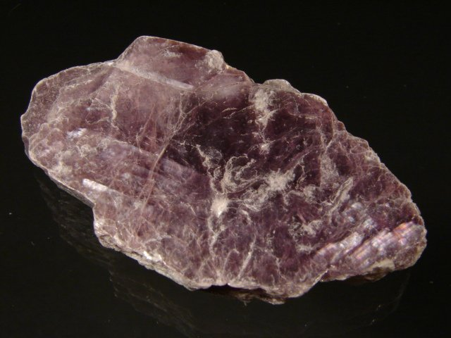 lepidolit blaszkowy, pochodzenie Brazylia; autor zdjęcia Piotr Gut 2006